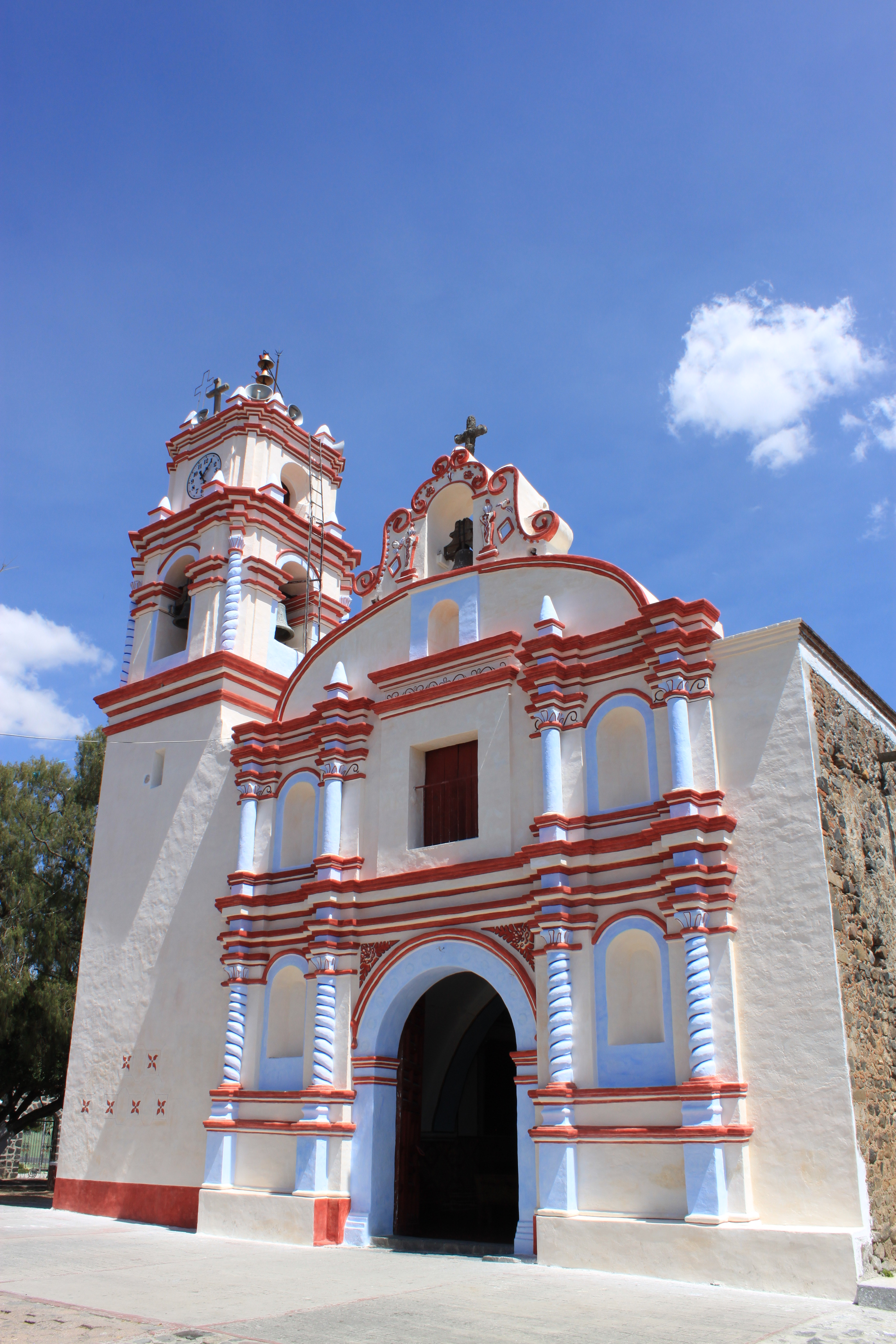 Iglesia de Nuestra Señora de la Asunción en Tlacotepec, Morelos, México.